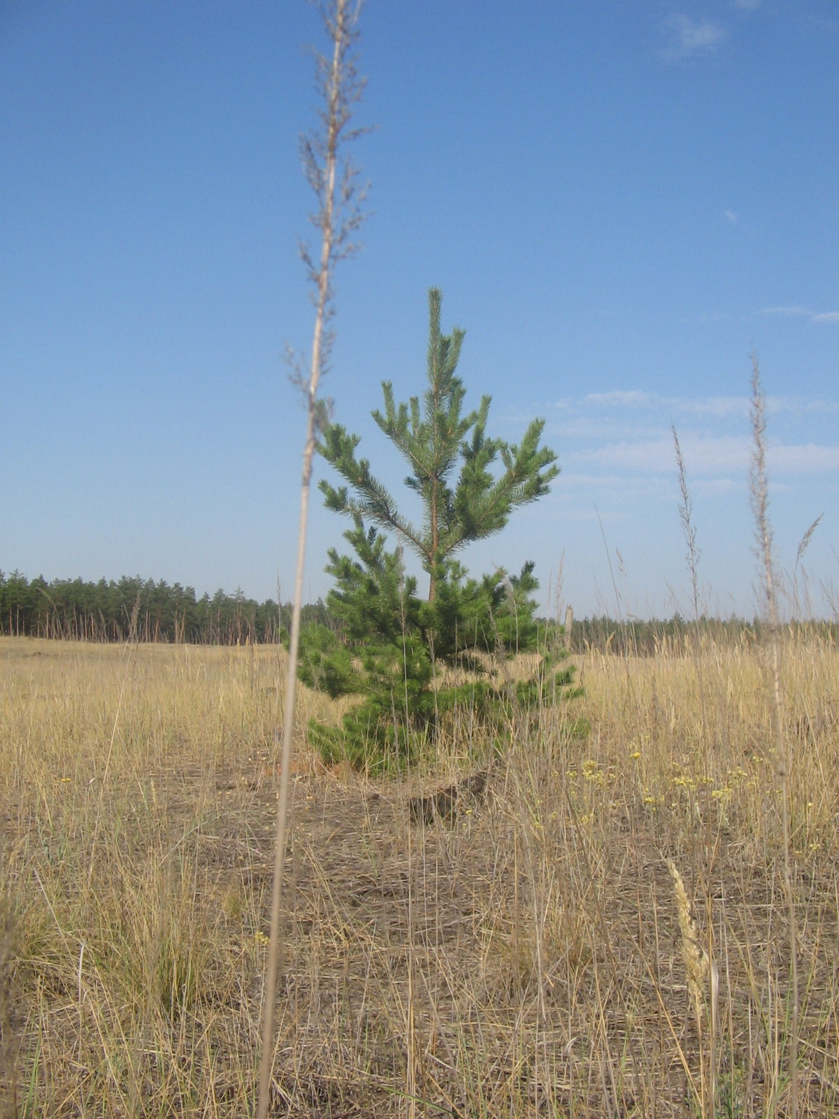 Щурово Щурово (ель)